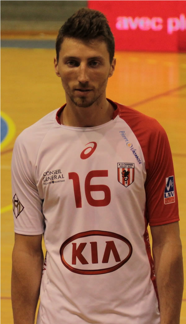 Nicolas Marechal sous les couleurs de l'AS Cannes lors de la saison 2012-2013.